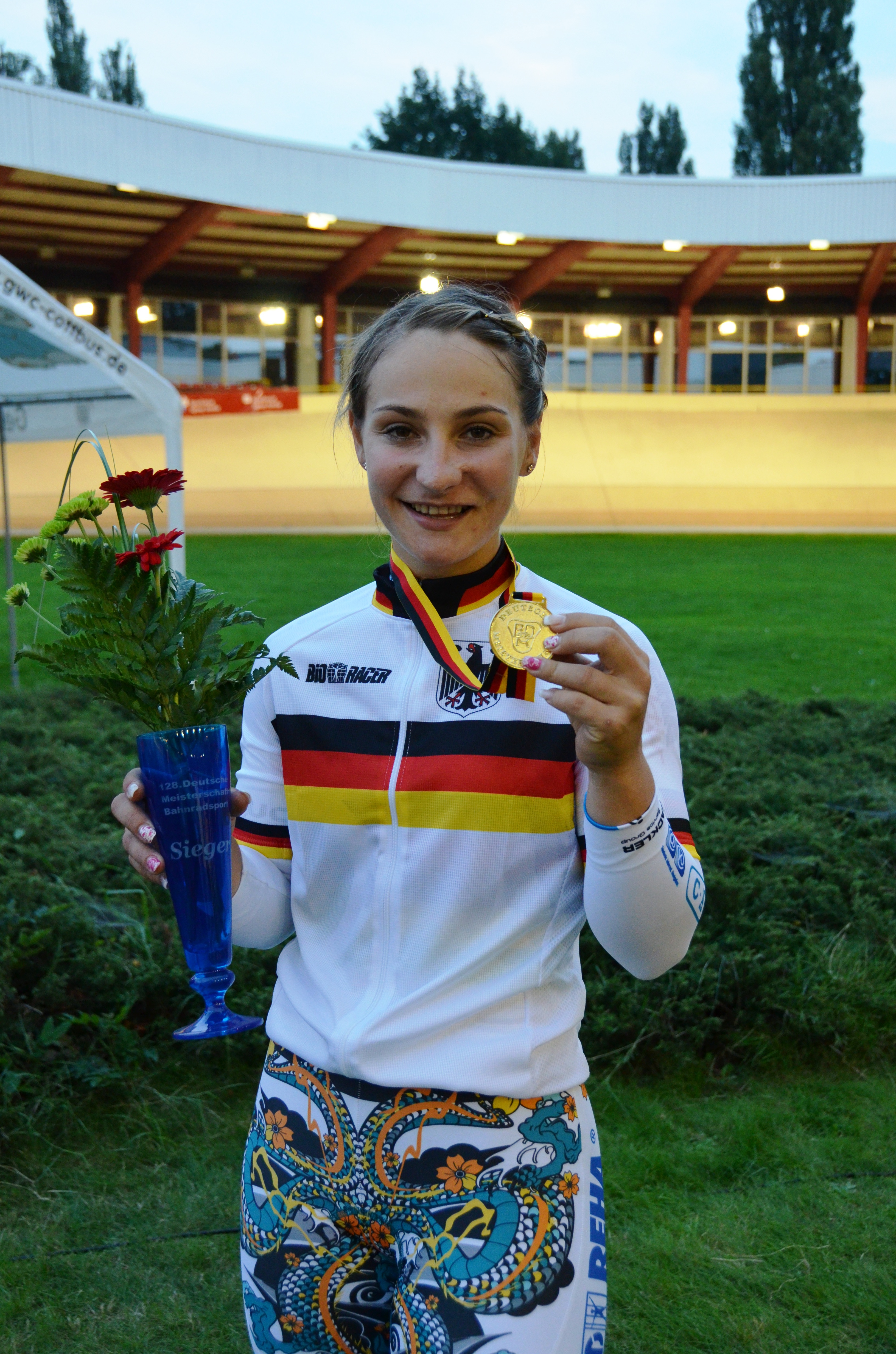 The making of this document was supported by the Community-Budget of Wikimedia Germany. Kristina Vogel, deutsche Radsportlerin